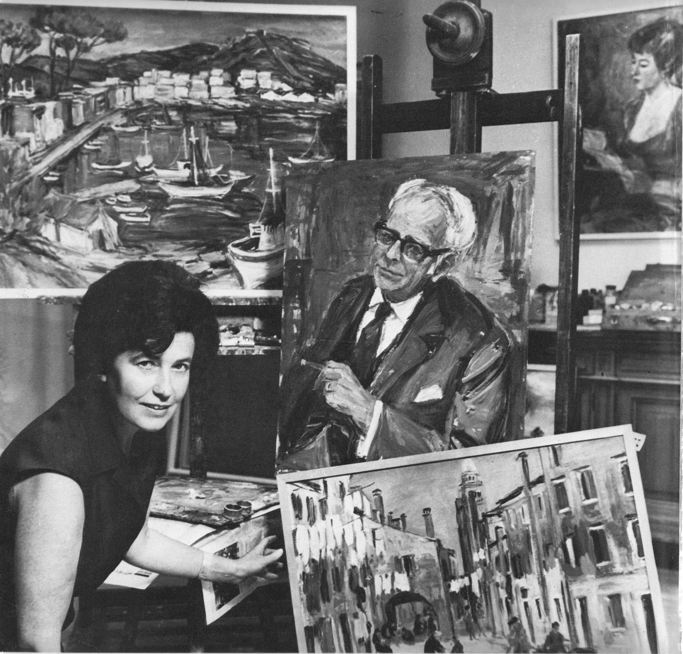 Magda Bittner-Simmet in ihrem Atelier in der Leopoldstraße 38 a mit Bildnis von Dr. F.C. Behl, 1968